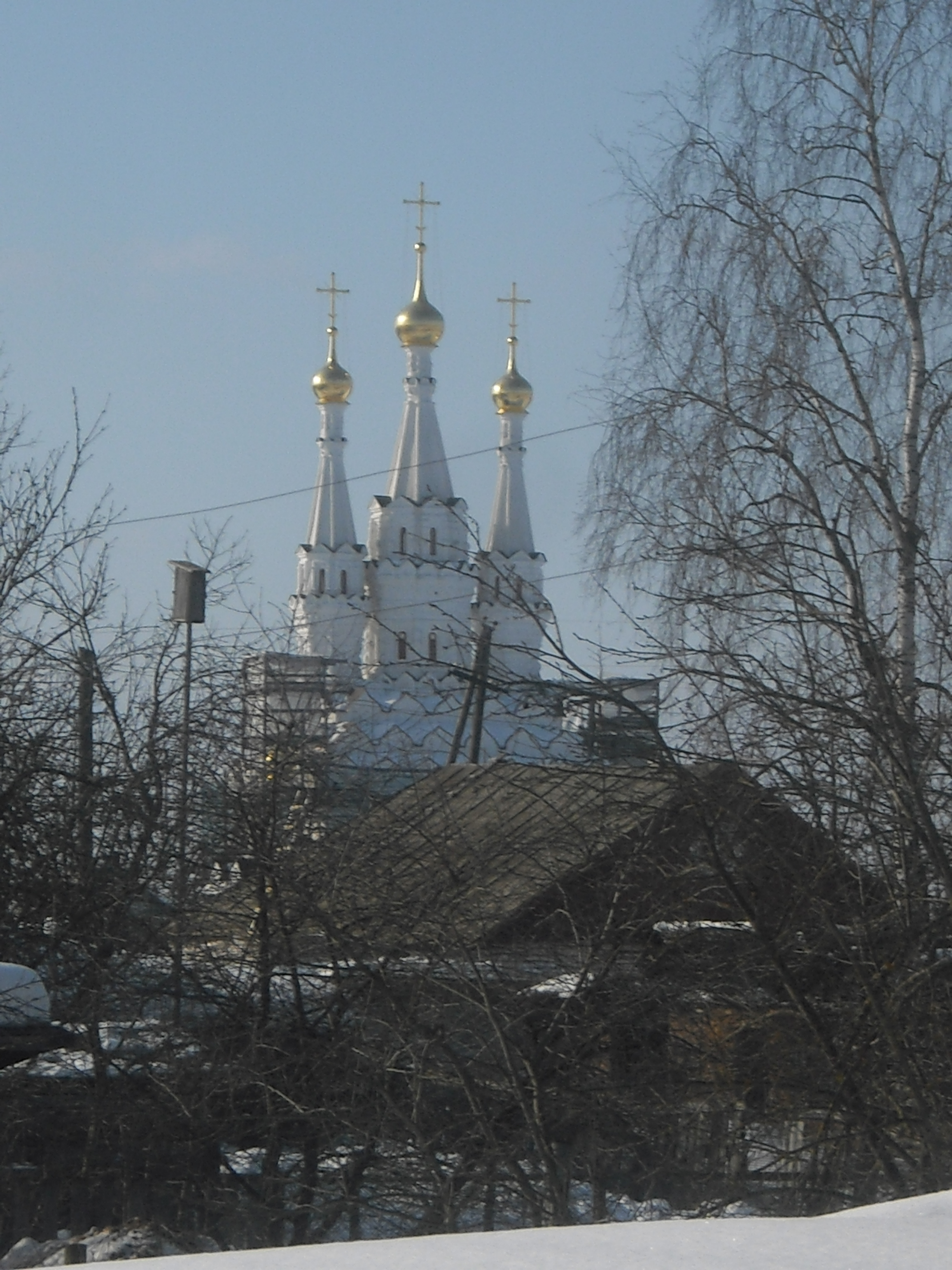 Церковь Одигитрии Смоленской в Вязьме